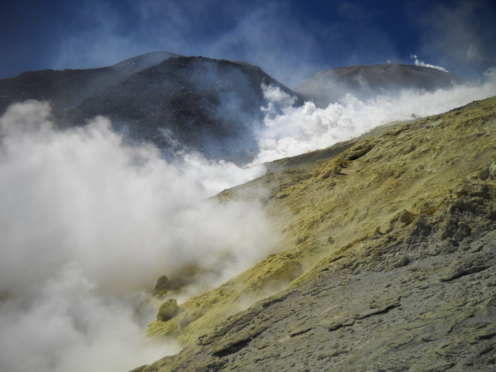 Violentas fumarolas que se desprenden de la ladera oeste del volcán Lastarria.